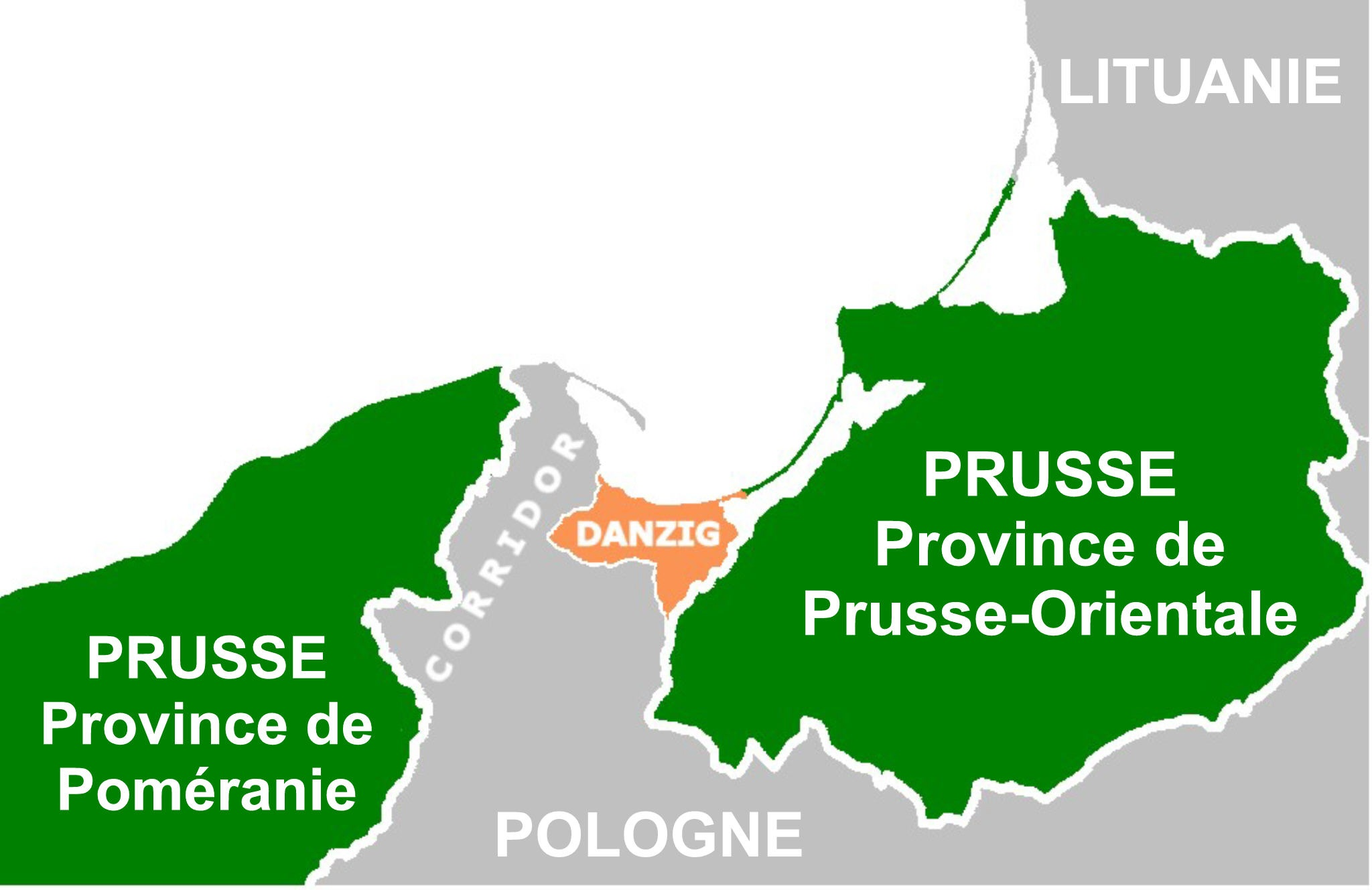 Mapa II RP z zaznaczonym tzw. Korytarzem Pomorskim. Mise en français de la carte du corridor de Dantzig, initialement en néerlandais